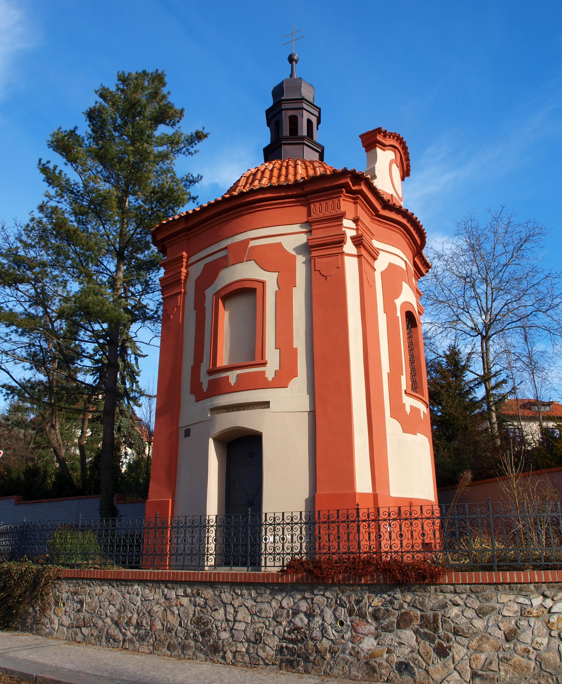 Praha-Smíchov, kaple Nejsvětější Trojice